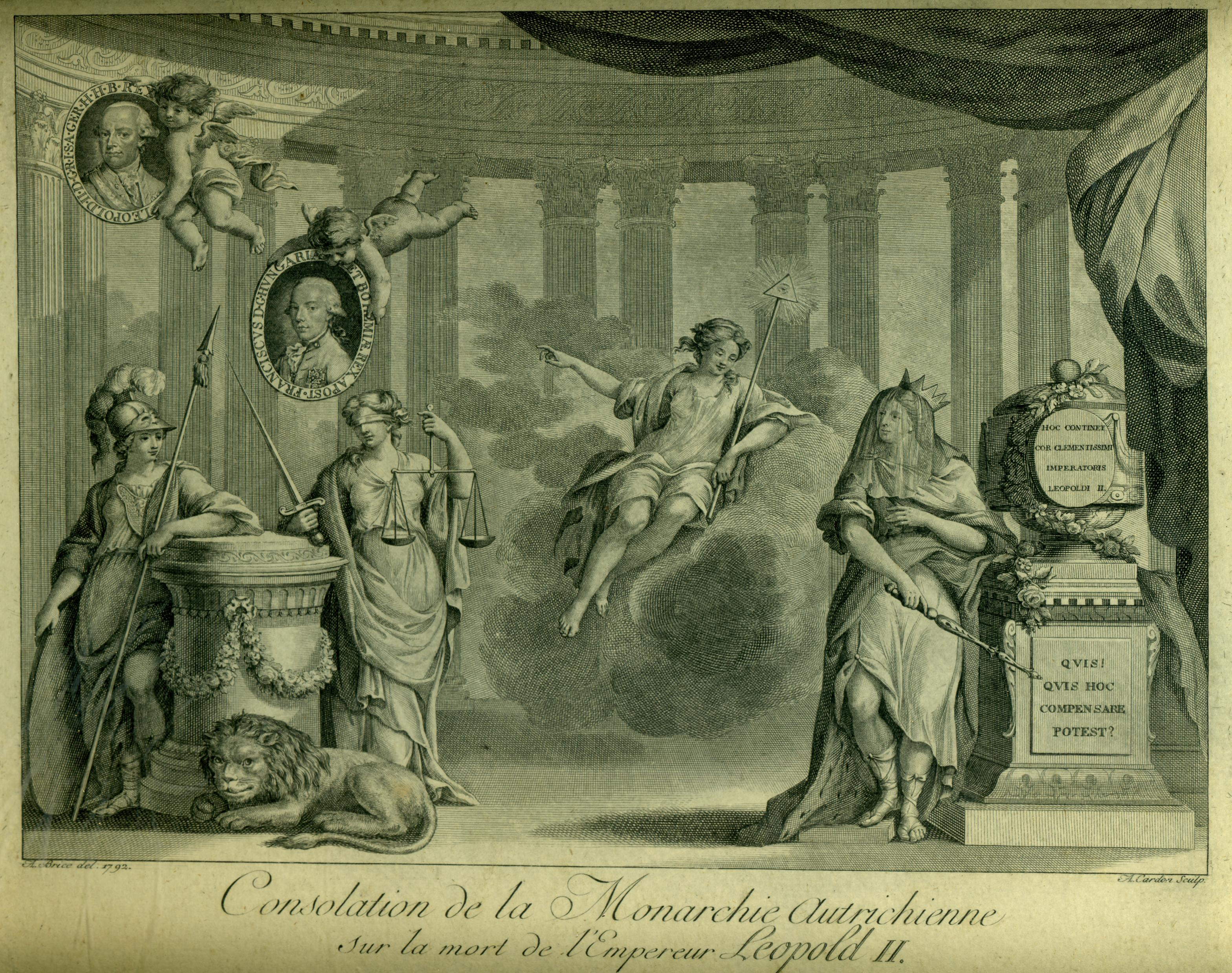 Consolation de la Monarchie Autrichienne sur la mort de l'Empereur Léopold II. Avec les inscriptions latines : dans cartouche ovale à droite HOC CONTINET/ COR CLEMENTISSIMI/ IMPERATORIS/ LEOPOLDI II. Sur le socle : QVIS ! /QVIS HOC/ COMPENSARE/ POTEST ?. Portrait médaillon oval inférieur : FRANCISCVS D.G.HVNGARIAE ET BOHEMIAE REX APOST. Entourant portrait médaillon supérieur gauche : LEOPOLD.II.D.G.I.S.A.GERM. H.H.B.REX. Signature : à gauche : A.Brice del. 1792, et à droite : A.Cardon Sculp.